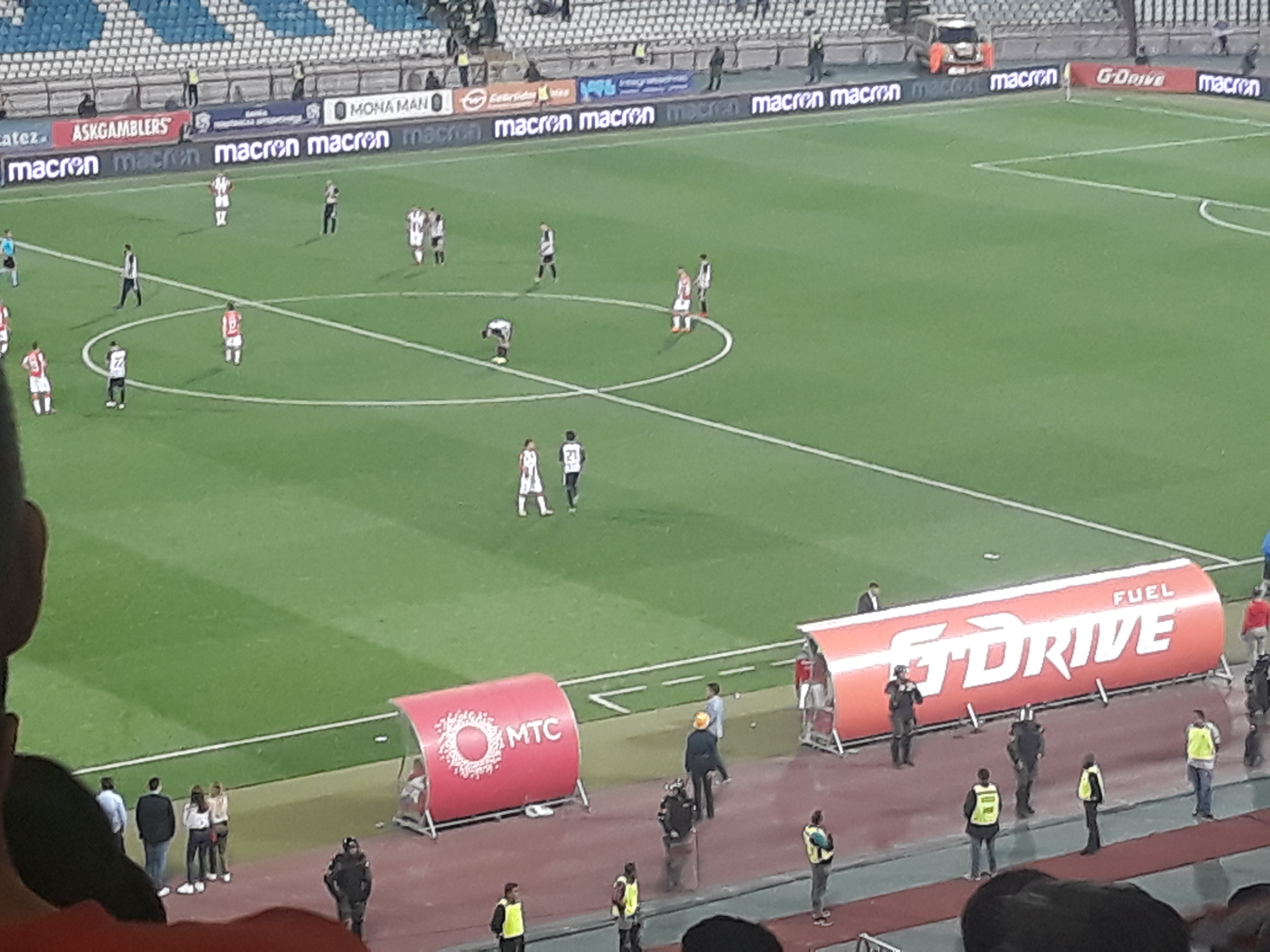 160. Вечити дерби, између Црвене звезде и Партизана, одигран на Стадиону Рајко Митић у Београду.